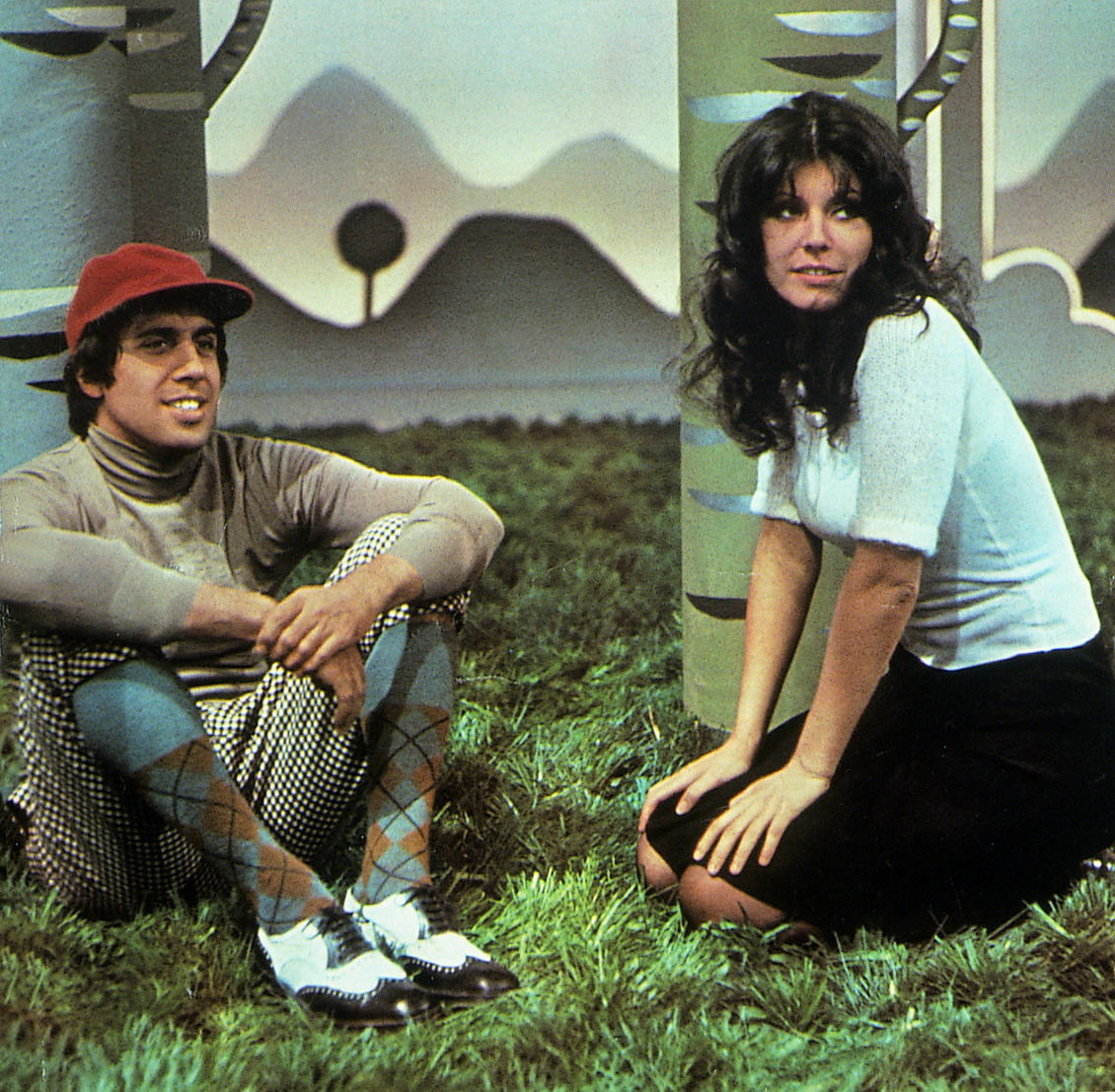 Italian singers Adriano Celentano and Claudia Mori